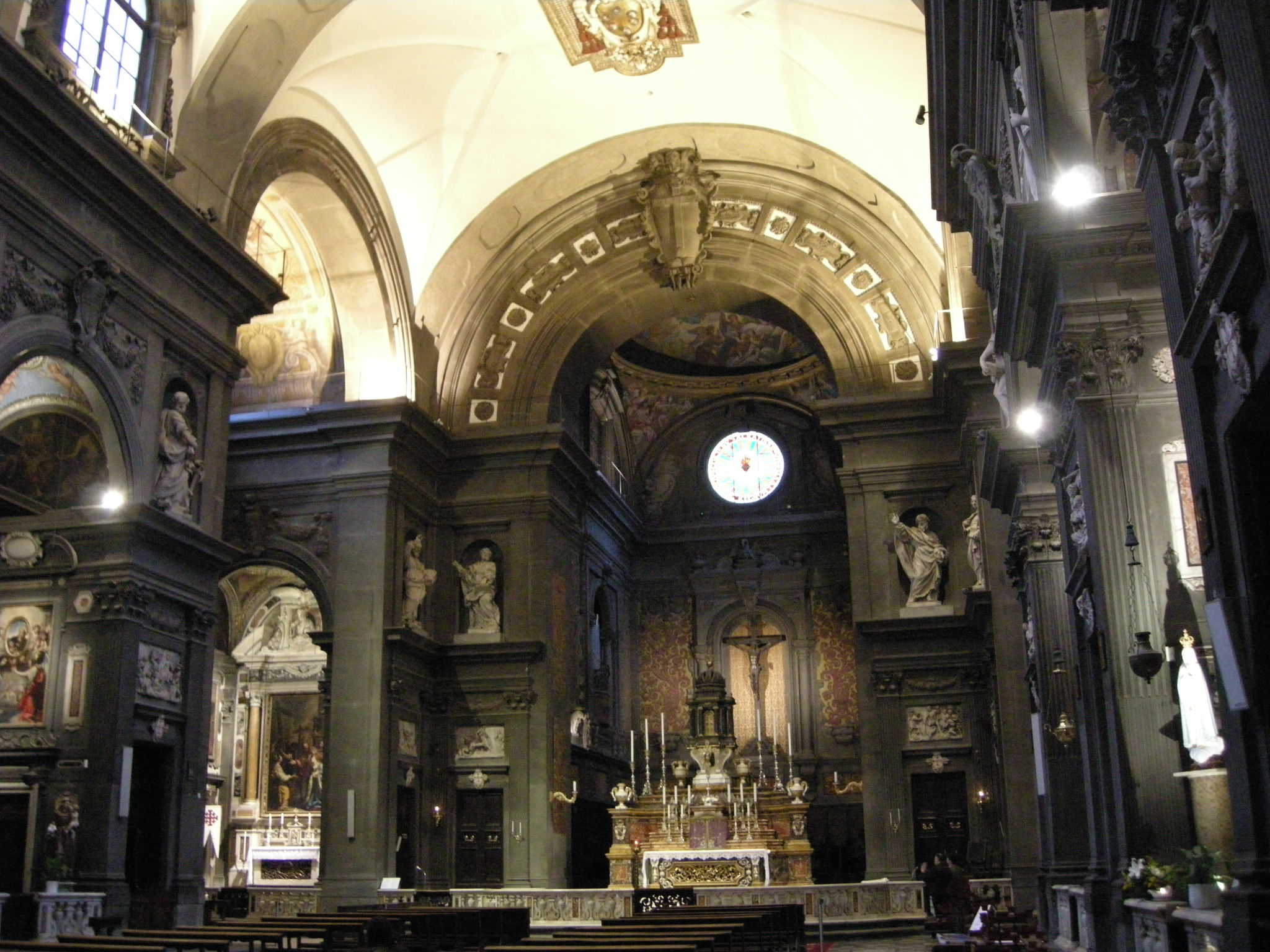 San agetano, interno 011